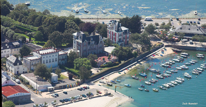 Les Villas de Kernevel. De gauche à droite : la villa Kerozen (1849), le château de l'Amirauté (fin XIXe siècle) et la villa Margaret (1896).